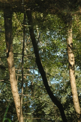 Zona umida nel Bosco Didattico della Provinca di Cremona